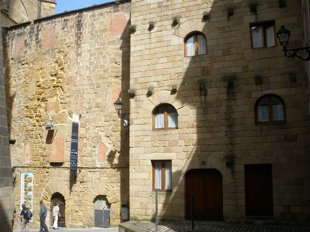 Casas Torres de Zarauz-Jauregia y de Ochoa Ibáñez de Olano (Getaria)